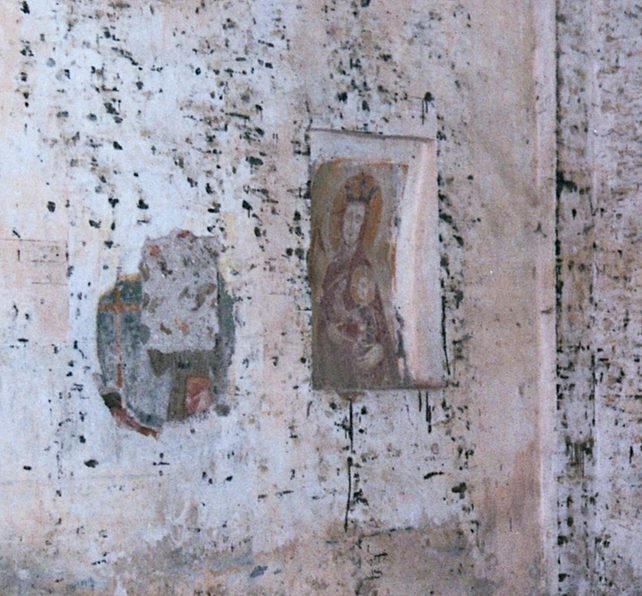 Fara Novarese (NO), Chiesa della Beata Vergine Addolorata o Madonna dei Campi, affresco della Madonna.